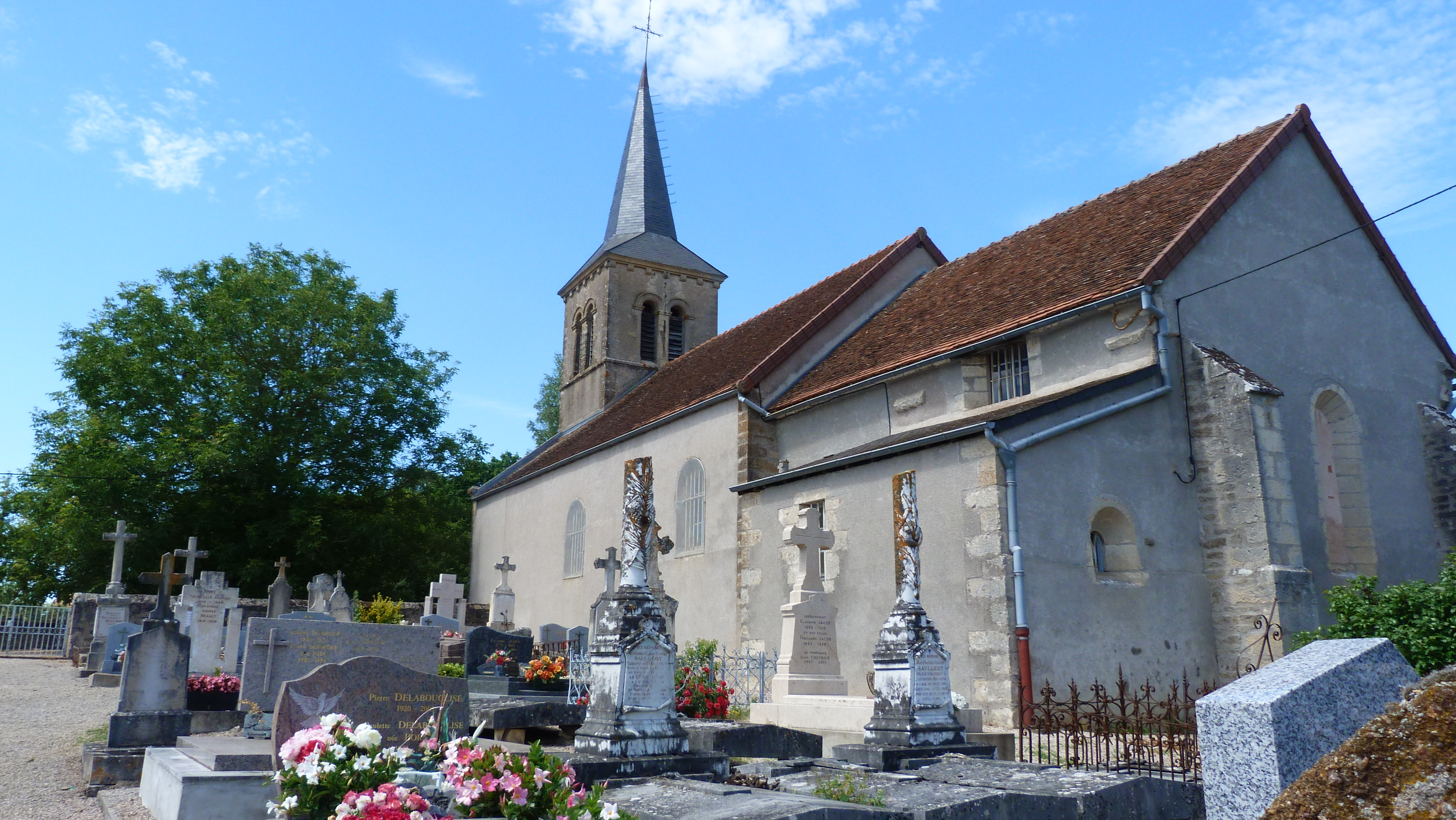 Preĝejo kaj tombejo Diancey